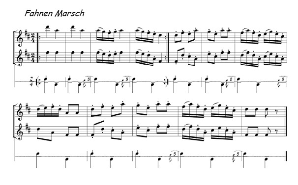 Fahnenmarsch aus der eidg. Tambour- und Pfeiferordonnanz von 1819.